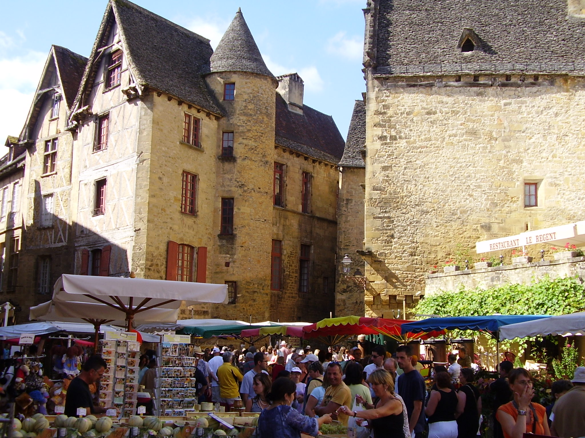 Sarlat- Perigord Noir